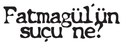 Logo de la serie de televisión Fatmagül